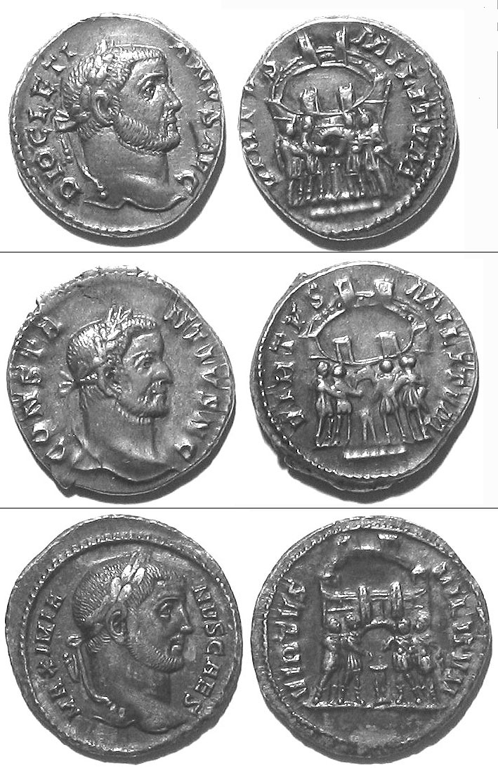 Argenteus von Docletian, Constantius Chlorus und Galerius.